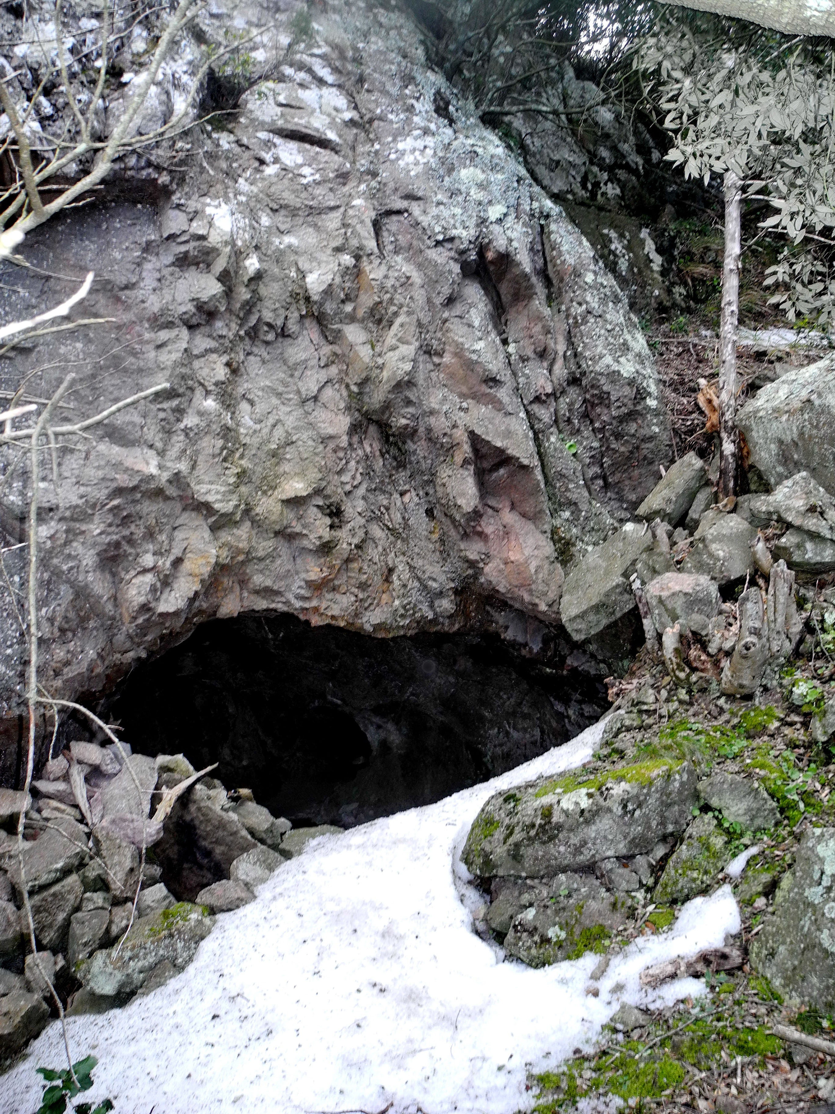 Grotte repère de Gaspard de Besse, l'étrangleur de l'Estérel